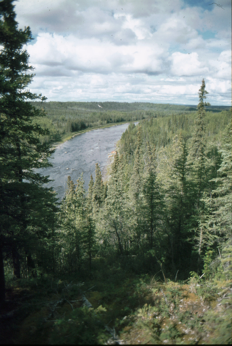 Gulkana River, Alaska, USA, Mittellauf